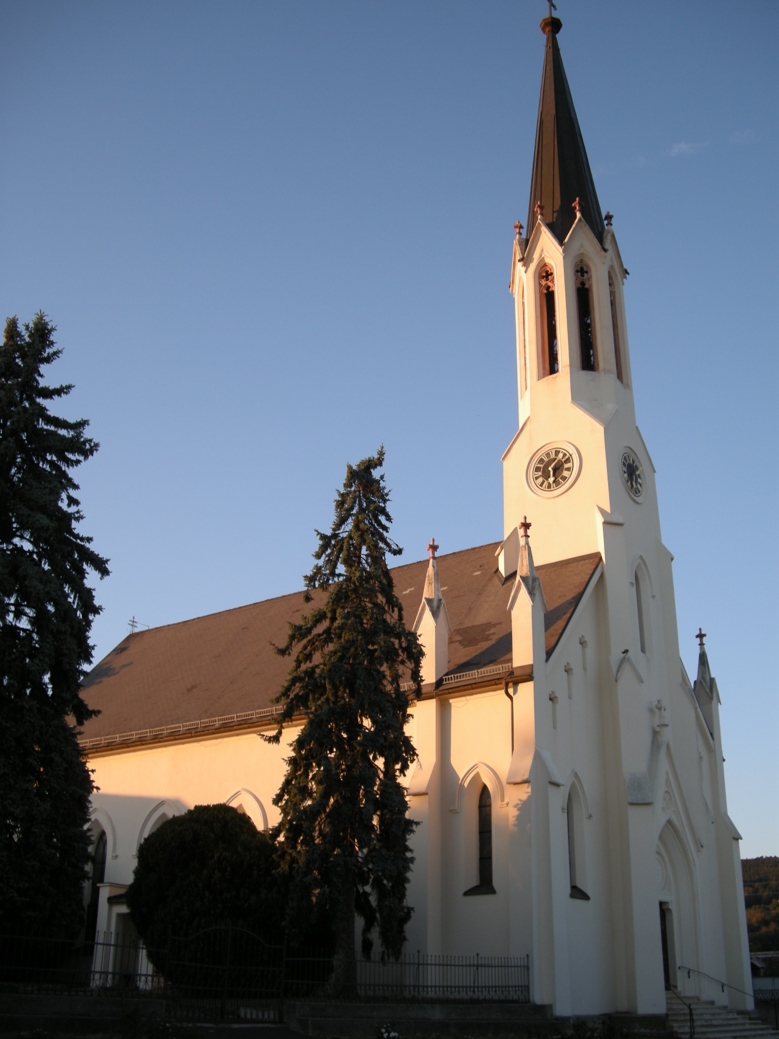 Evang. Pfarrkirche A.B. Rechnitz